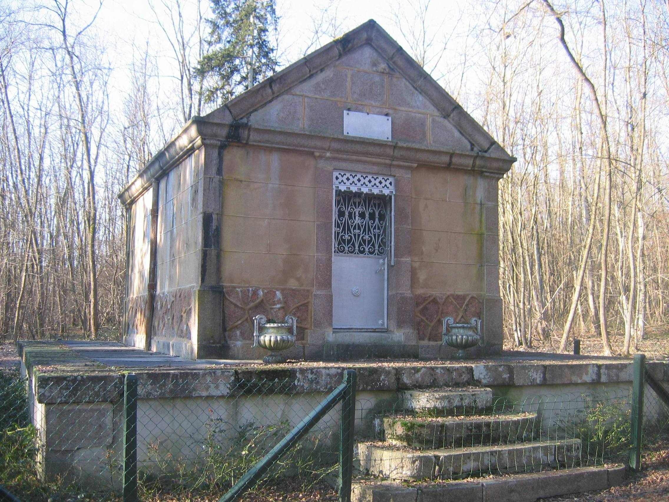 Tombeau de Georges Gallay (1812-1880)